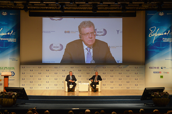 Специальная сессия с участием А.Л. Кудрина на Примаковских чтениях 2018